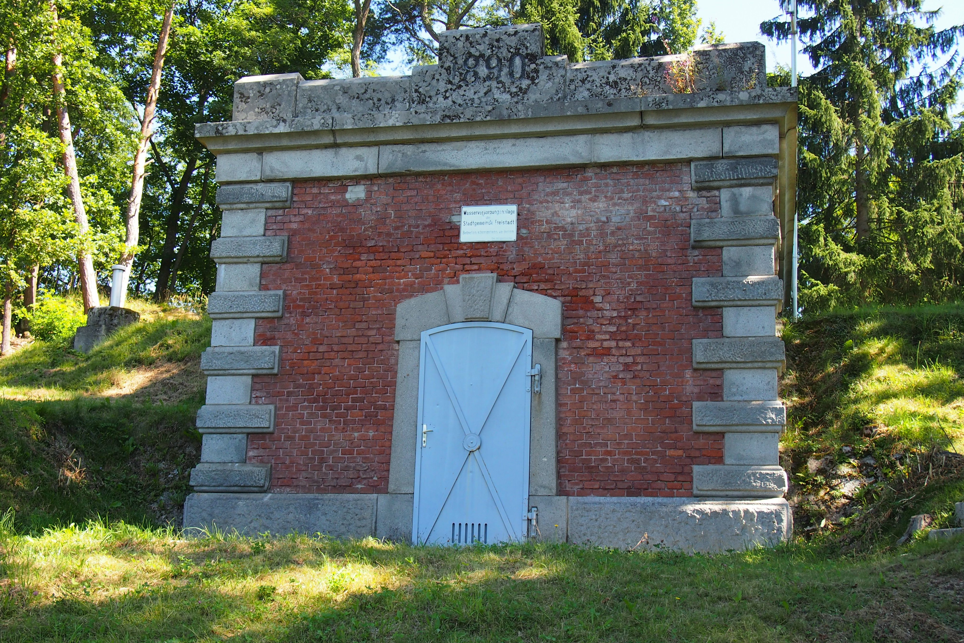 Wasserversorgungsanlage